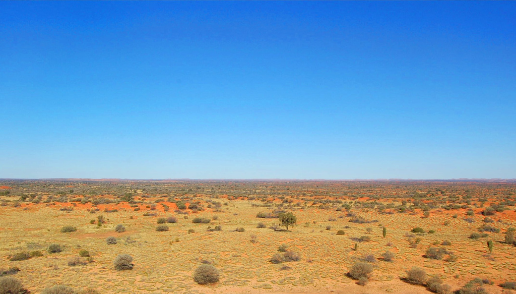 Désert de Simpson 4Australie)